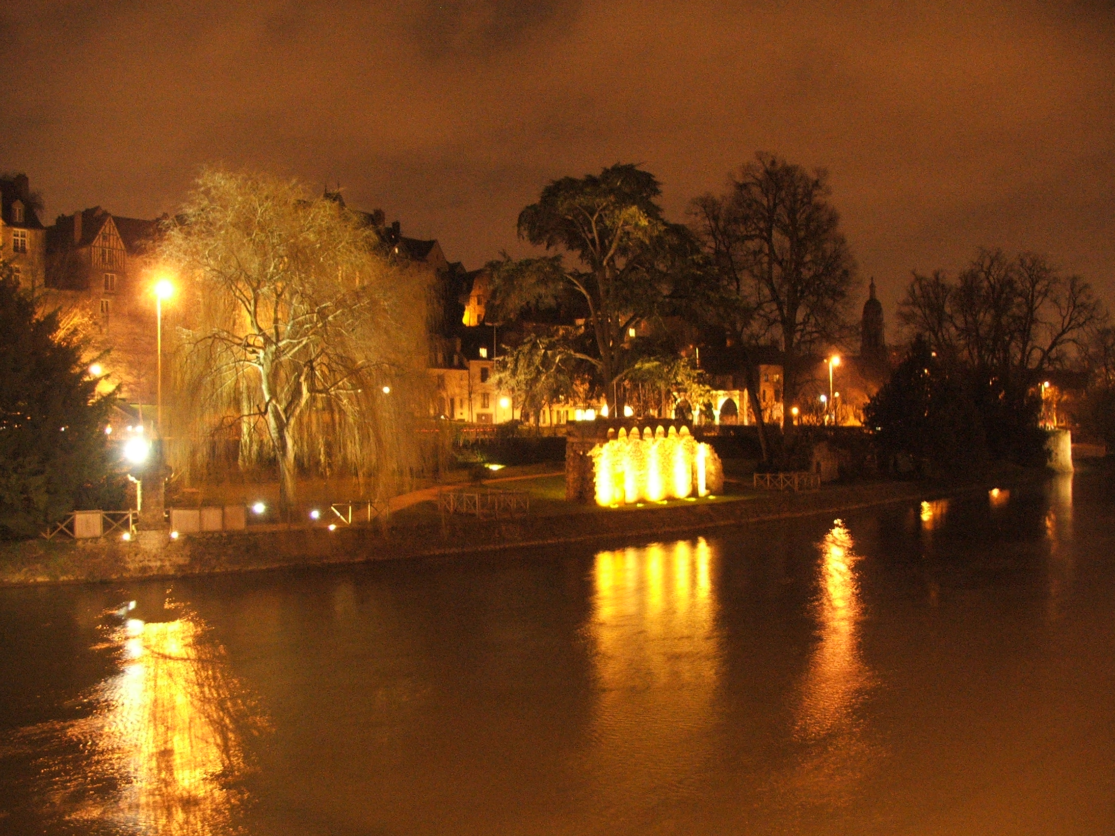 Le parc des tanneries au Mans, vue depuis la rive opposée de la Sarthe.